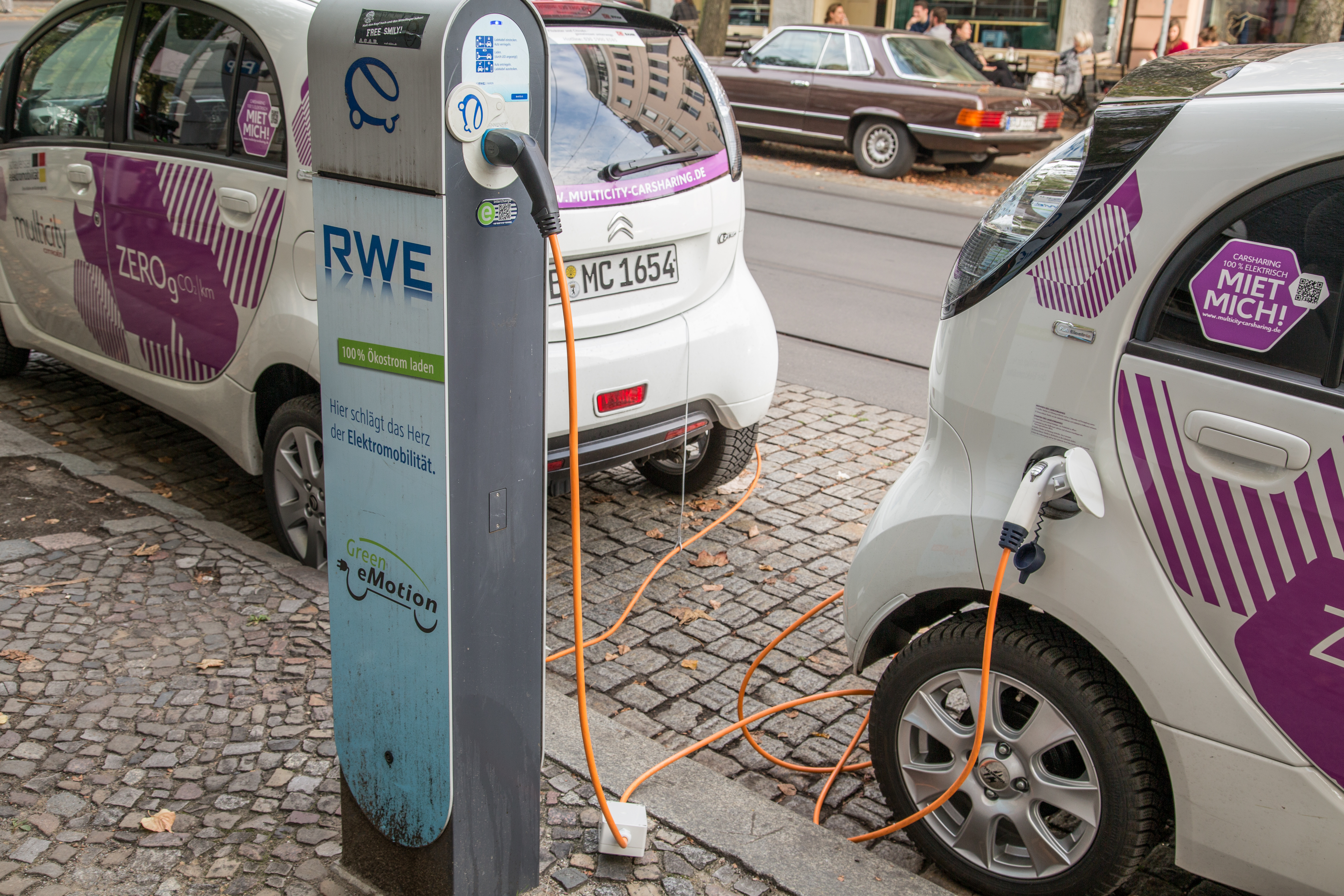 Zionskirchstraße / Fehrbelliner Straße / Veteranenstraße, Berlin, Germany